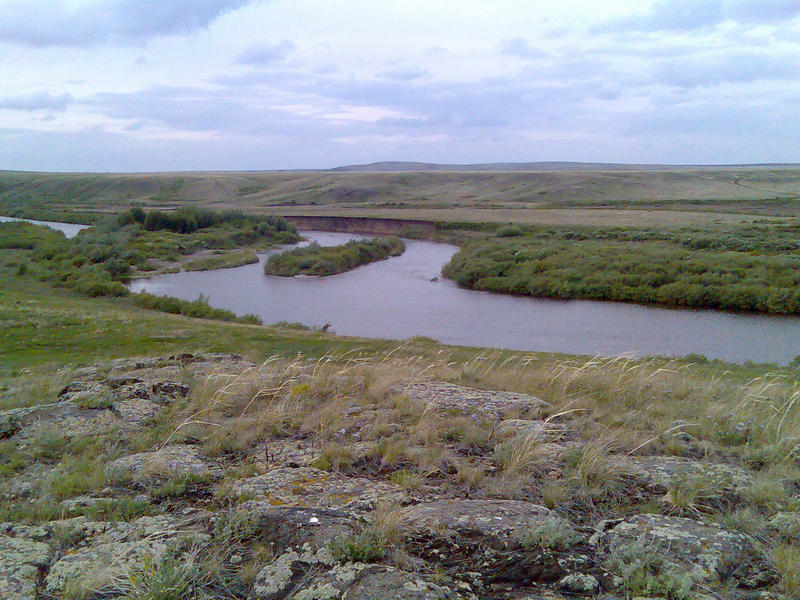 Зигзаг